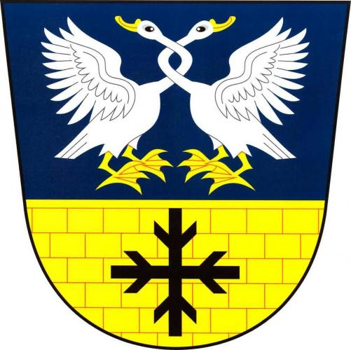 znak, Chvalatice, okres Znojmo